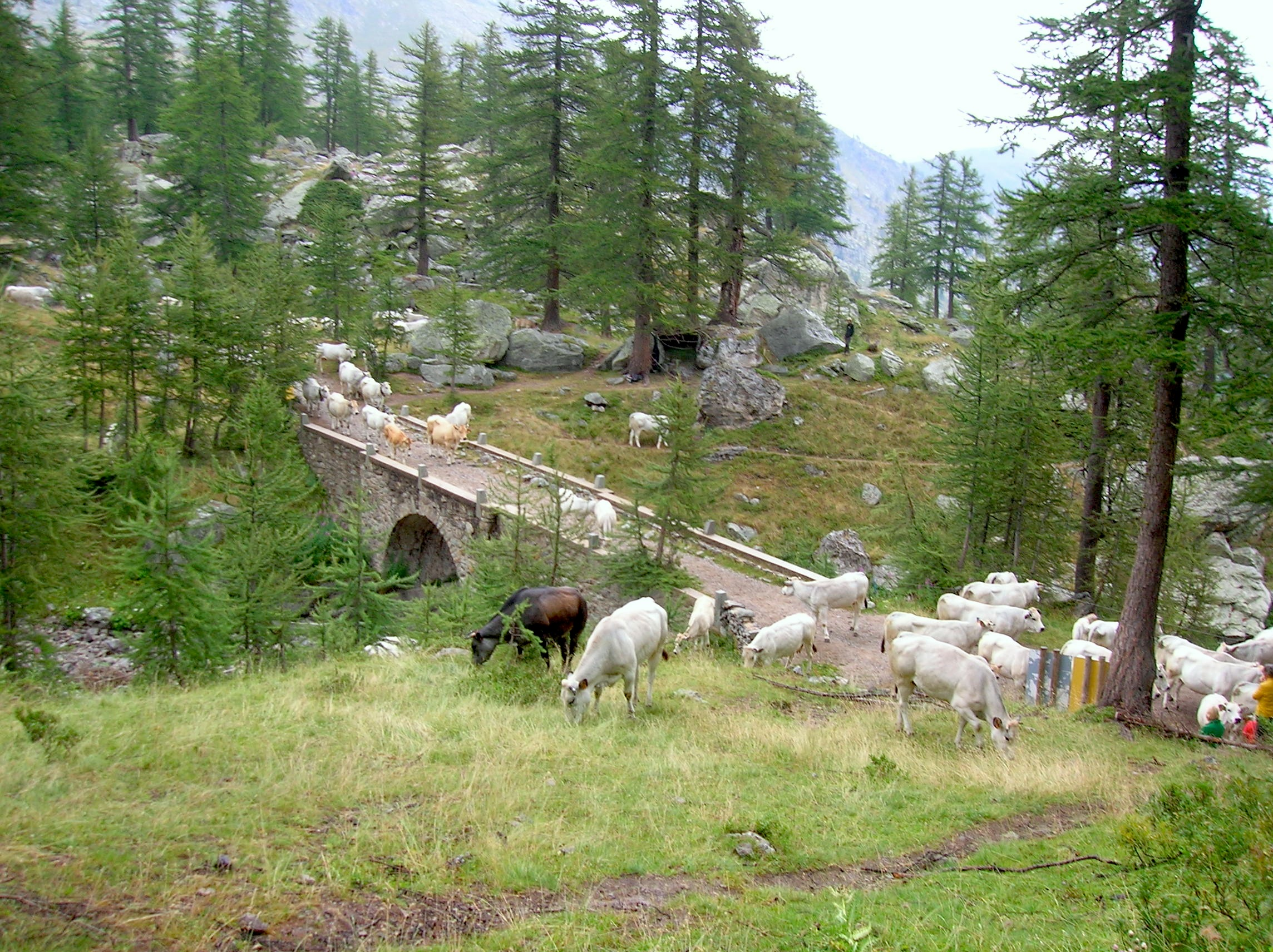 pont vers le Gias des Pasteurs. Secteur de Fontanalbe. Tende, Alpes-Maritimes, Provence-Alpes-Côte d'Azur, France.